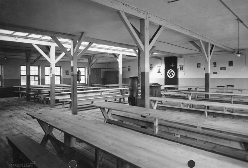 Gemeinschaftsraum eines Lagers des RAD (Reichsarbeitsdienst). Bildarchiv Franken, Reichsautobahnen-Oberste Bauleitung Nürnberg Autor: R.A.D.